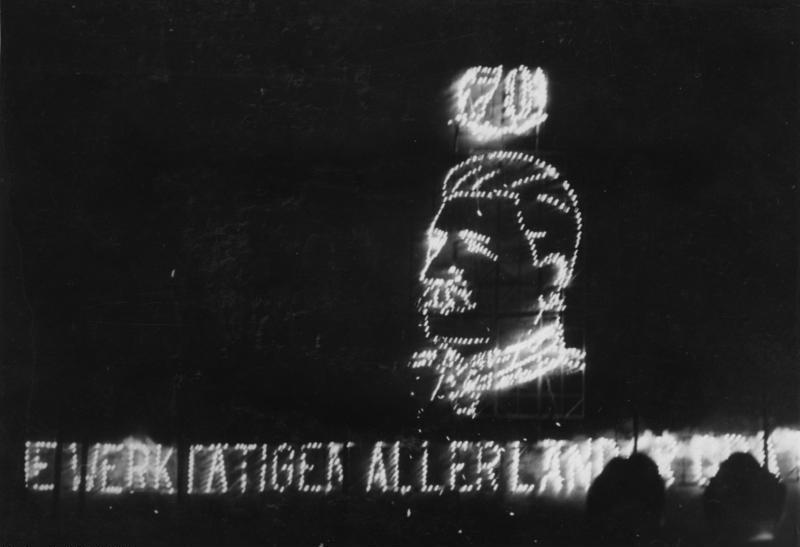 Berlin, Großkundgebung zum 70. Geburtstag von J.W. Stalin Großkundgebung zum 70. Geburtstag von J.W. Stalin. Am 21.12.1949 fand in Berlin eine gewaltige Demonstration anläßlich des 70. Geburtstag von J.W. Stalin statt. Die Frankfurter Allee wurde in "Stalinallee" umbenannt und an der Weberwiese im Bezirk Friedrichshain wurde der Grundstein zur ersten Wohnzelle im Rahmen des Bauprogramms des demokratischen Magistrats gelegt. Den Abschluß der Kundgebung bildete ein Feuerwerk. U.B.z.: Höhepunkt des Feuerwerks: Ein Prträt Stalins in leuchtenden Farben Aufn.: Illus/Kemlein 21.12.1949 4851-49 Abgebildete Personen: Stalin, Josef W.: 1878-1953; Marschall, Vorsitzender des Ministerrates, Generalsekretär der KP, Sowjetunion (GND 118642499)